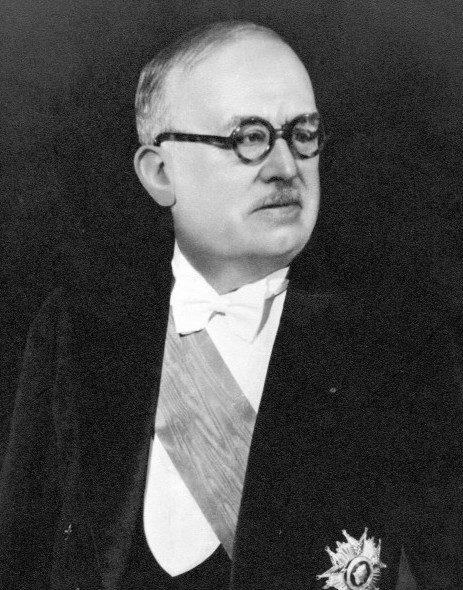 Portrait officiel du président de la République française (1947-1954) Vincent Auriol.